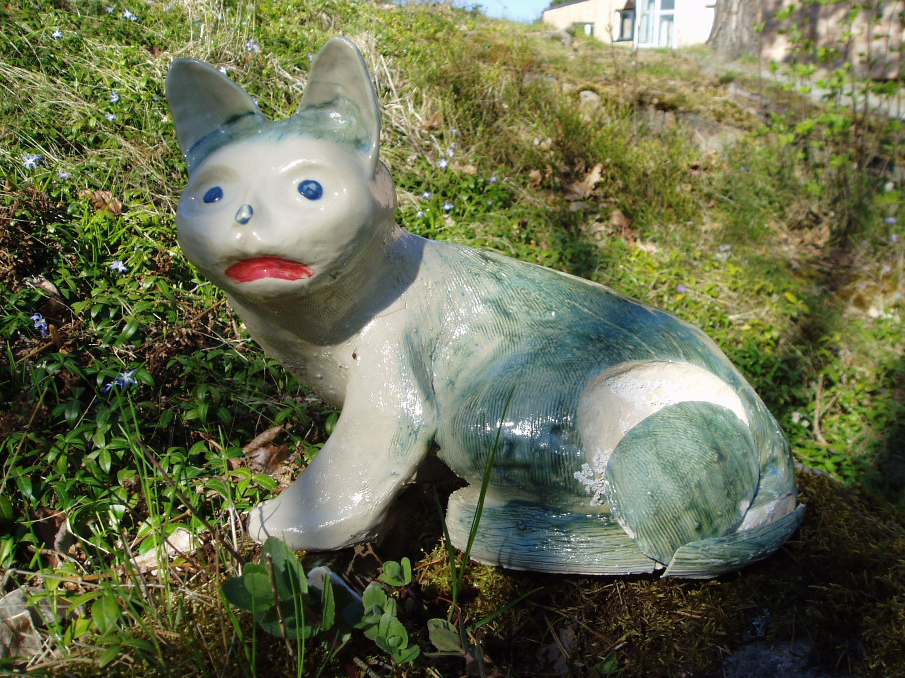 Kattskulptur i parken vid Nyckelviksskolan, Lidingö